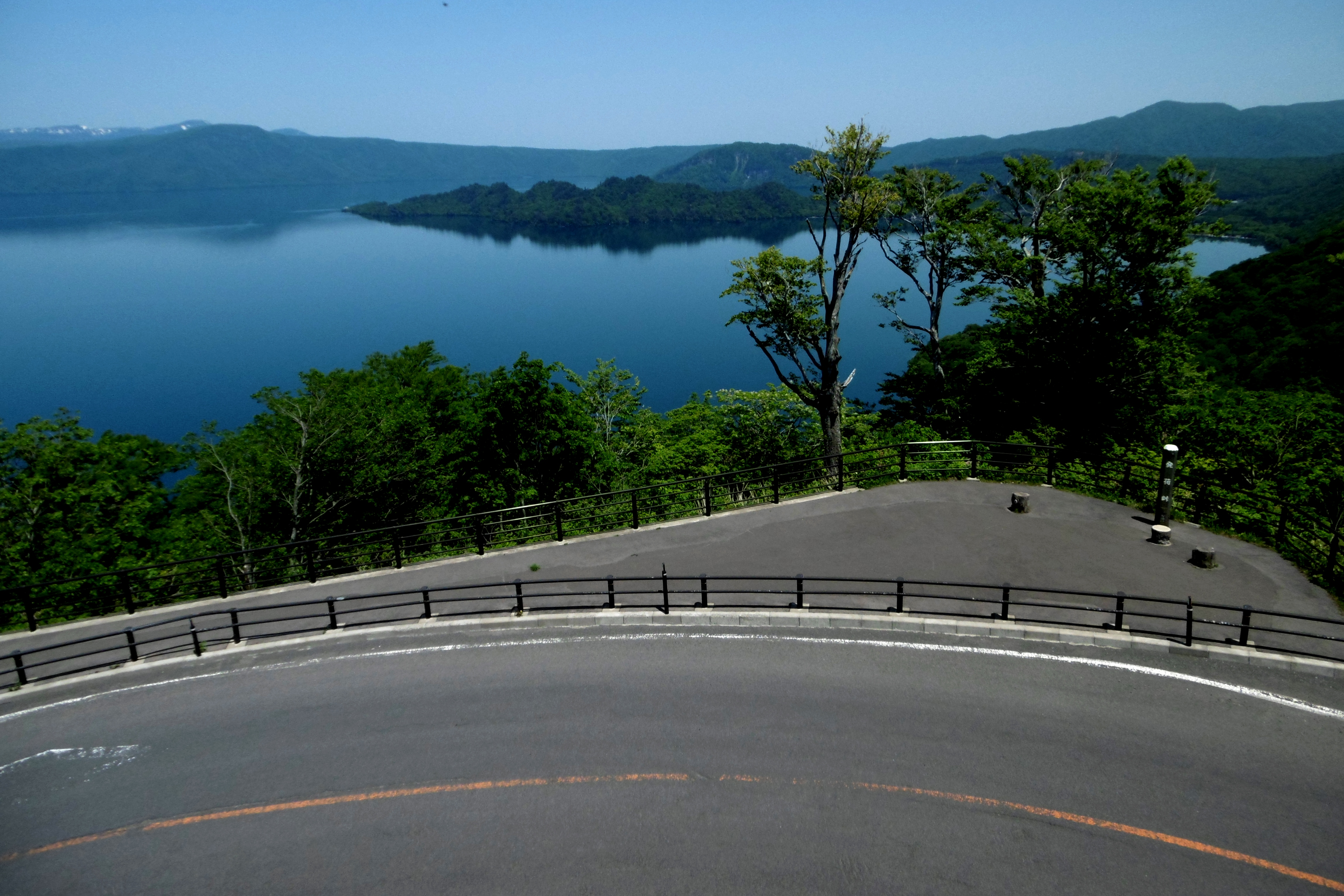 十和田湖 発荷峠（秋田県鹿角郡小坂町 国道103号線）